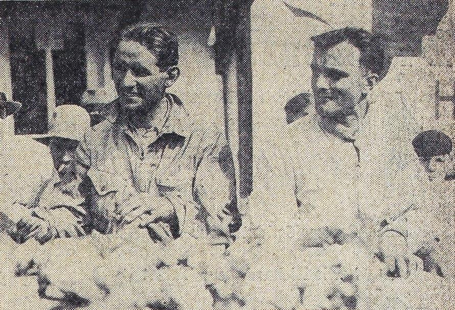 Raymond Sommer (G) et Luigi Chinetti (D), vainqueurs des 24 Heures du Mans 1932.